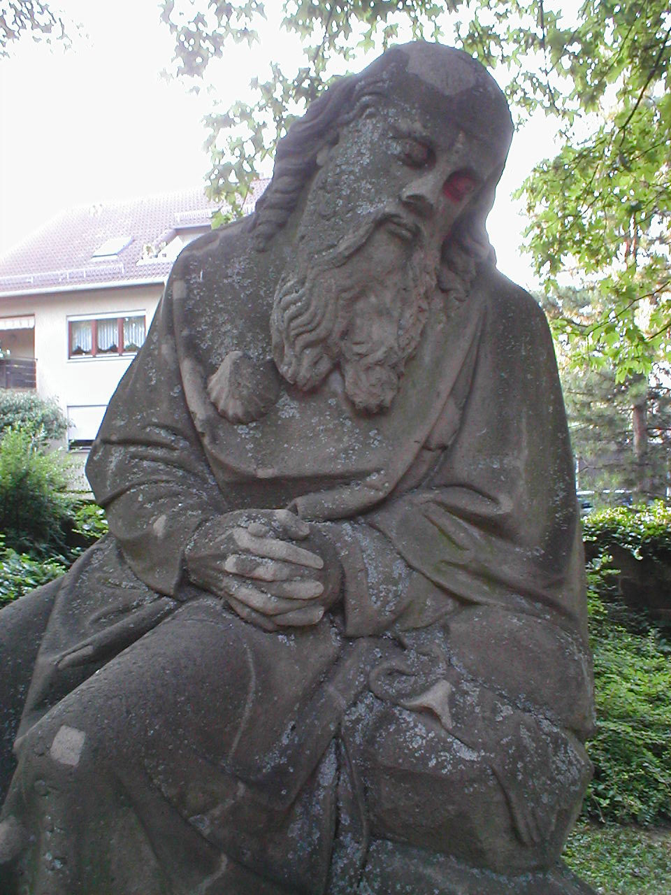 Historische Steinskulptur im Alten Friedhof in Heilbronn-Böckingen